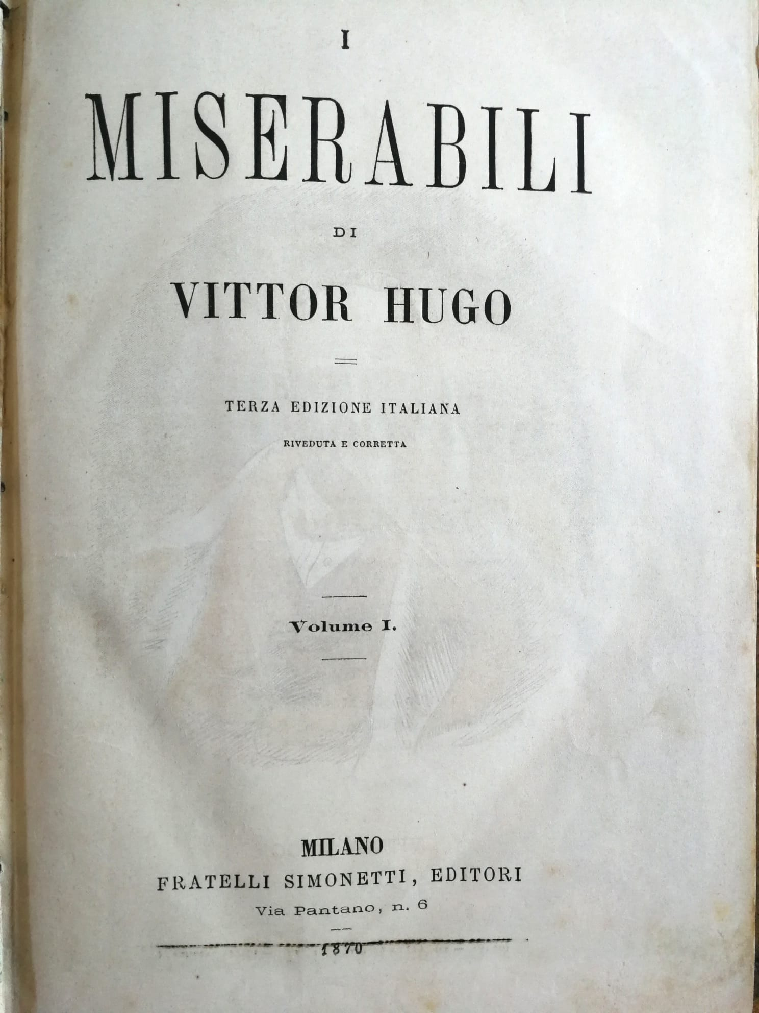 Frontespizio originale dell'edizione italiana 1870, fratelli Simonetti, Milano. 2 vol.